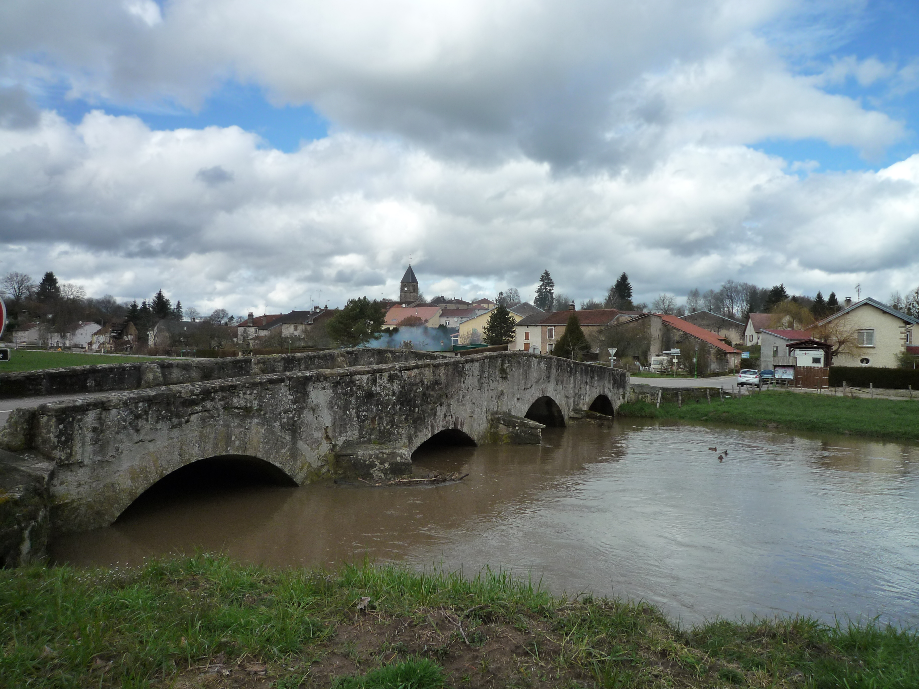 La Saône, après une semaine de pluie, au vieux pont d'Attigny (Vosges)